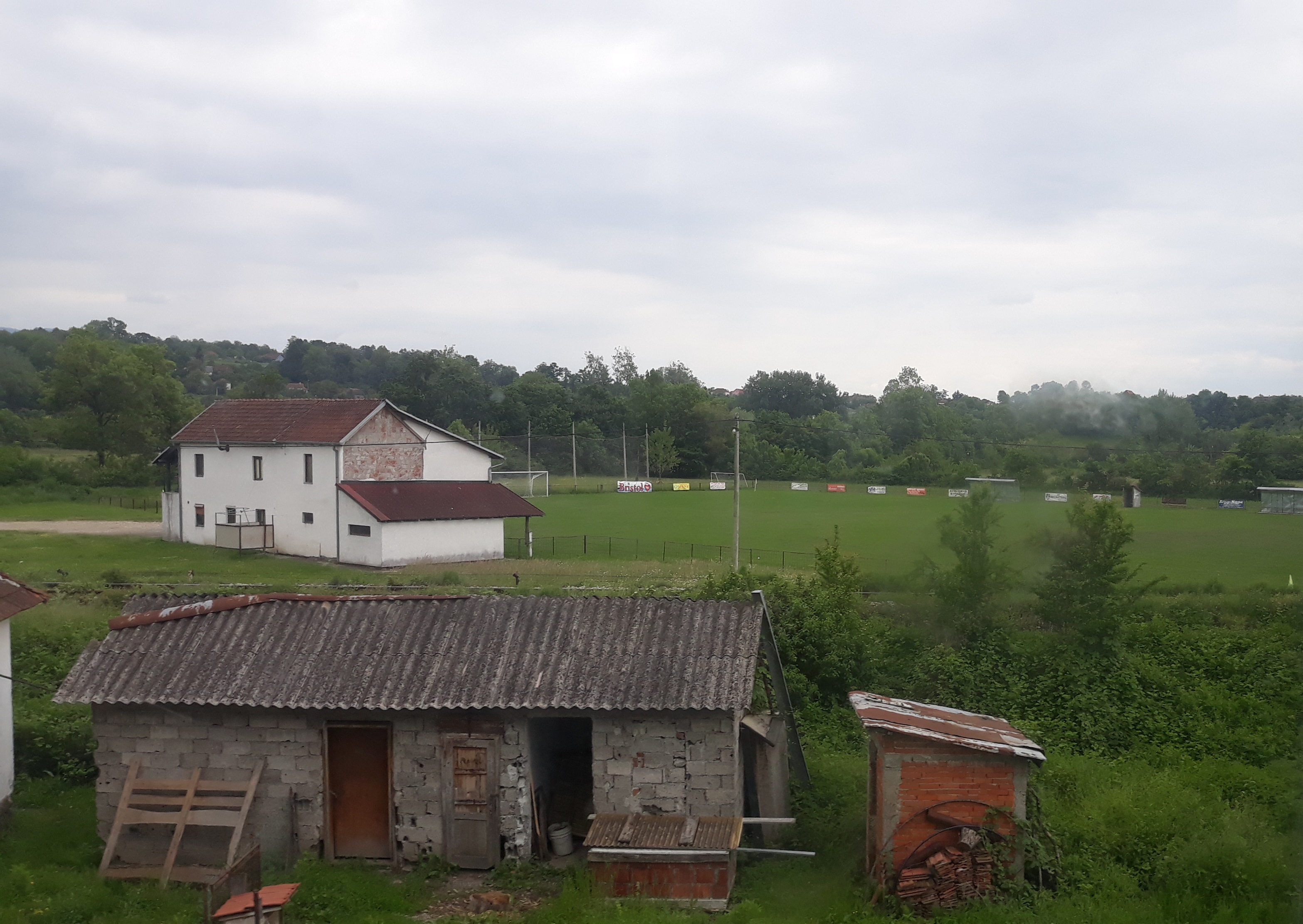 Фудбалски терен у Витановцу код Краљева, где своје утакмице као домаћин одиграва екипа Груже